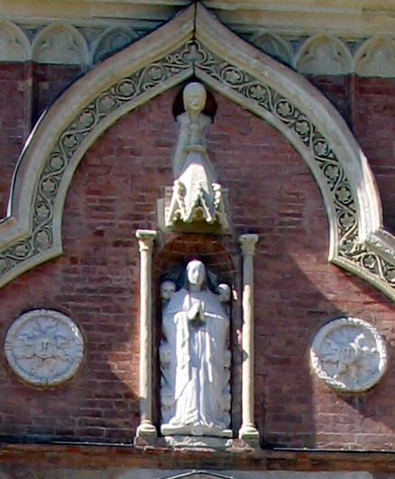 Asti Cattedrale particolare , foto fatta da me faberh 2006